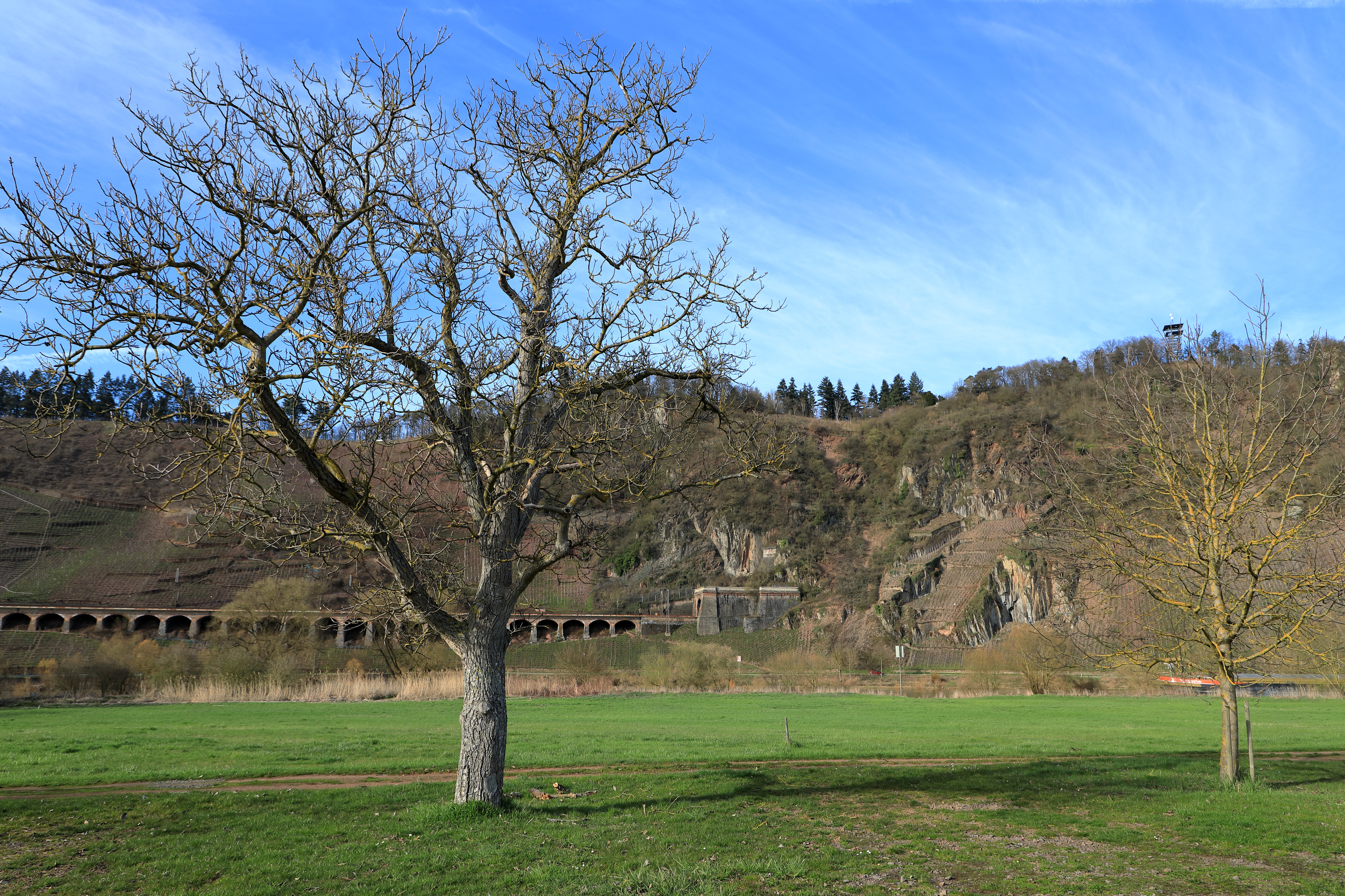 Das Pündericher Hangviadukt von der gegenüberligenden Moselseite bei Pünderich gesehen. Es ist das längste Hangviadukt in Deutschland.